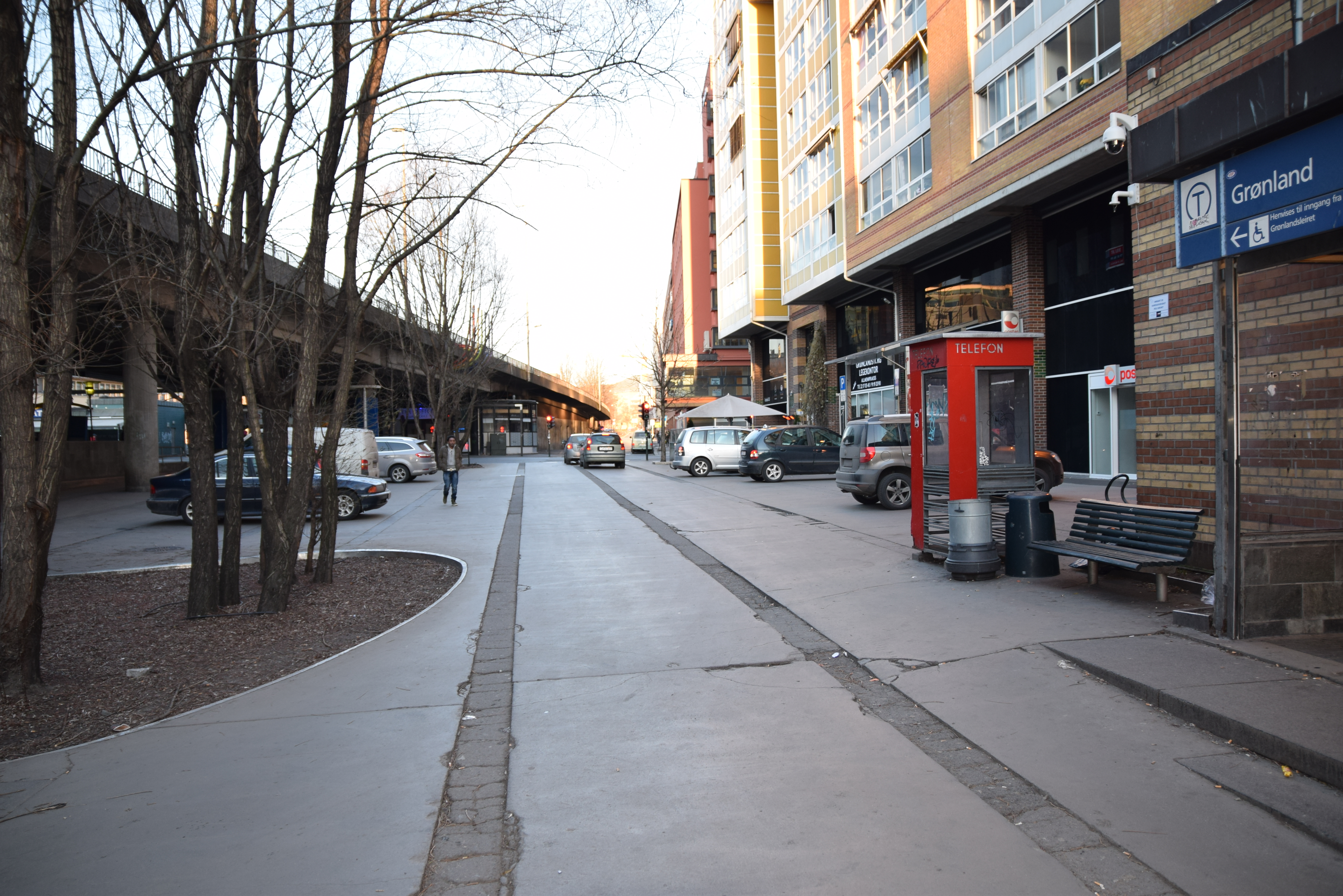 Olafiagangen, Grønland, Oslo, sett mot nord fra utløpet av gaten Smalgangen